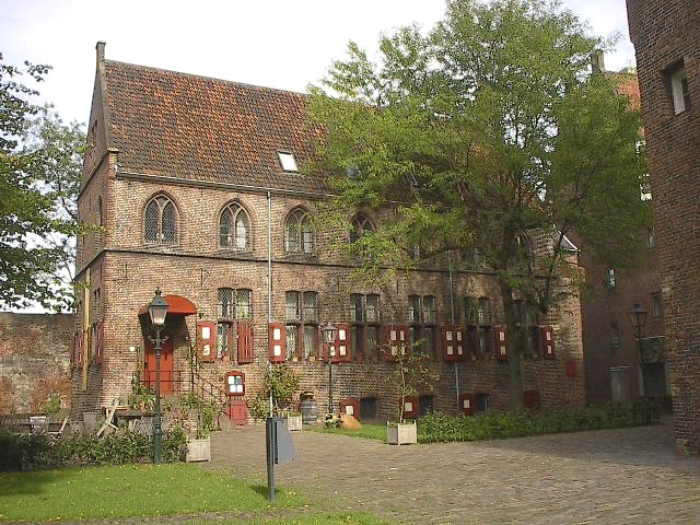 De Librije